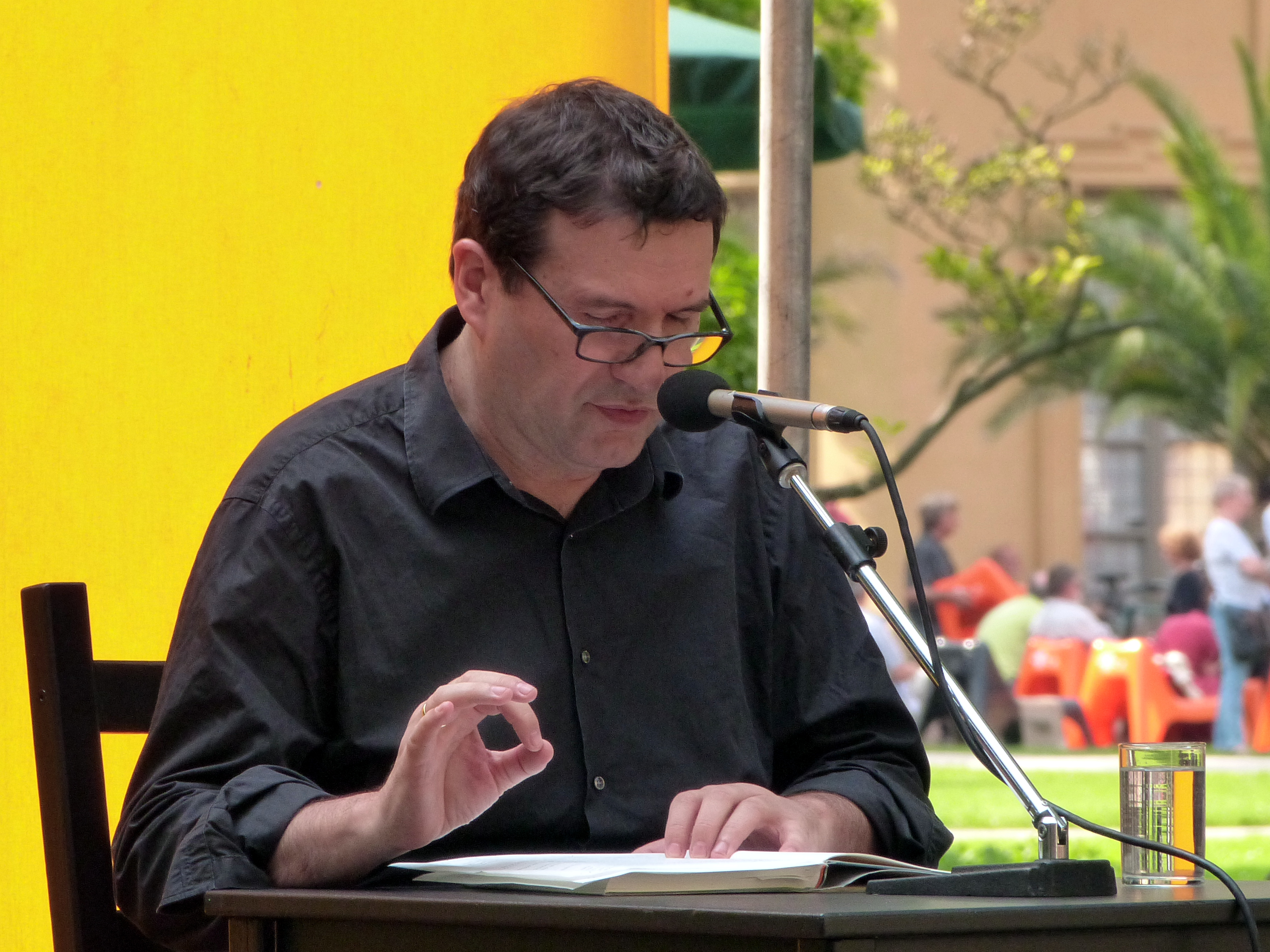 Der Lyriker Oswald Egger bei einer Lesung auf dem Erlanger Poetenfest 2017.